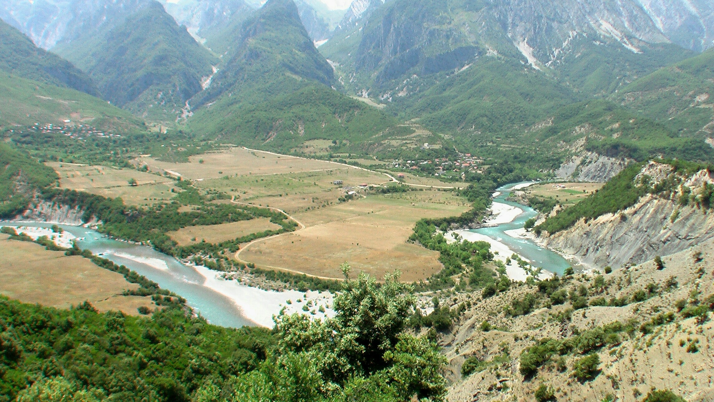 VjosaBeiÇarshovë